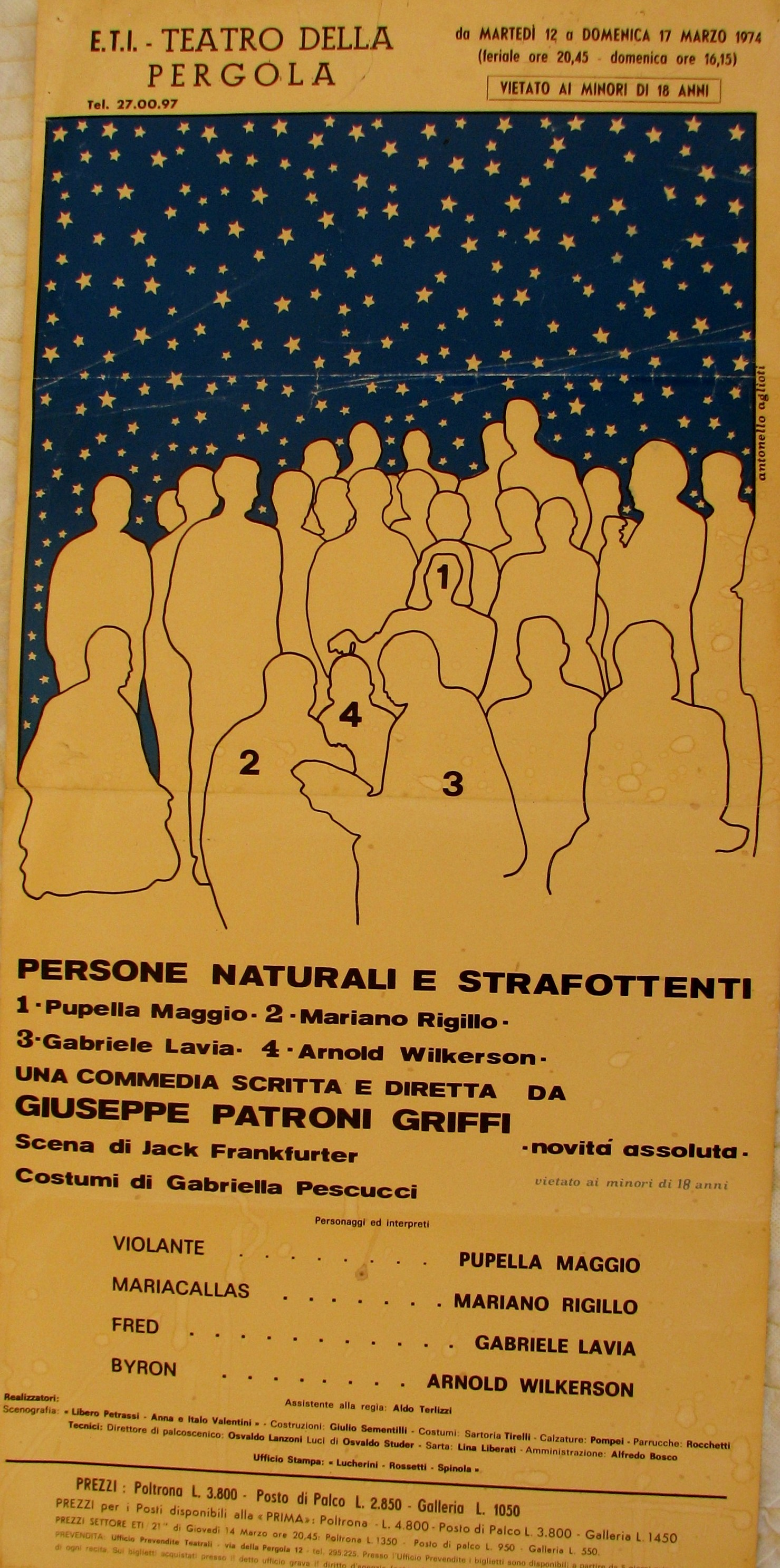 Locandina della prima rappresentazione teatrale (1974) di "Persone naturali e strafottenti", commedia di Giuseppe Patroni Griffi